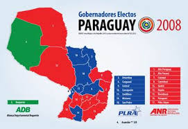 gobernaciones en 2008